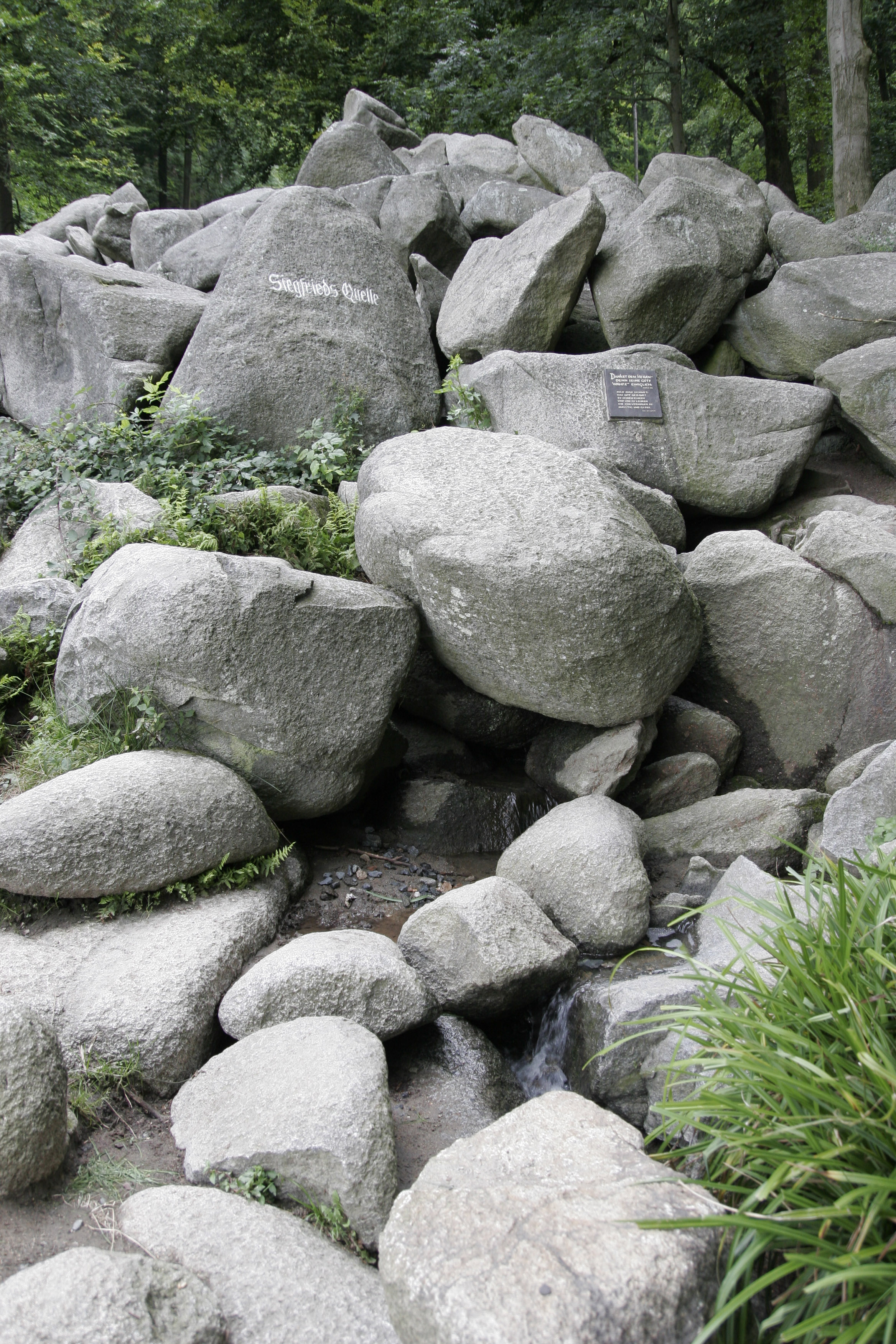 Die Siegfriedsquelle im Felsenmeer bei Lautertal (Odenwald) Ortsteil Reichenbach